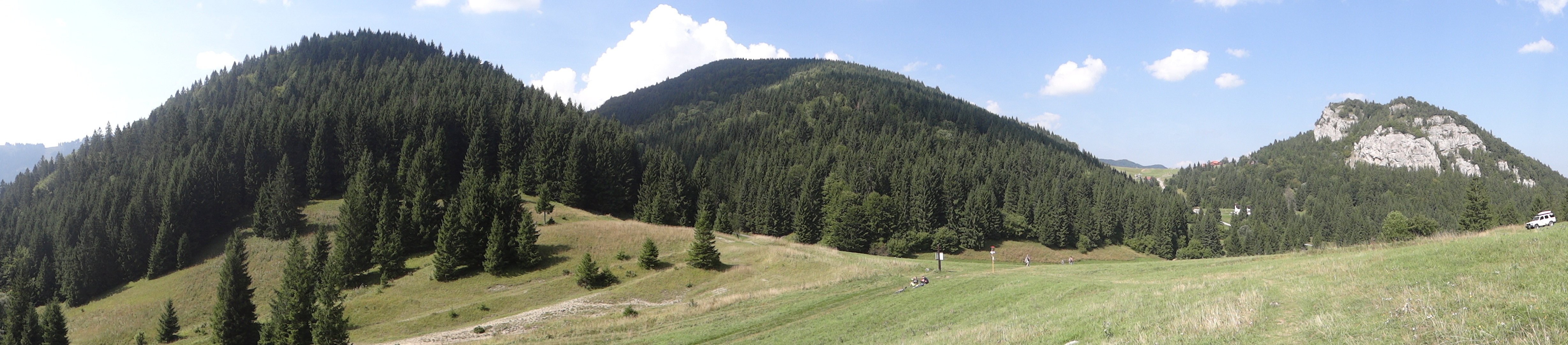 Sedlo Pod Sidorovom